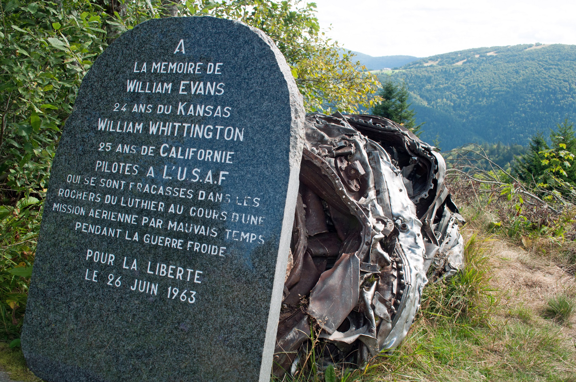 Dans la matinée du 25 juin 1963, deux avions de guerre américains, des F-100 Super Sabre, s'écrasent en même temps dans les roches du Luthier au Ballon de Servance, en raison du mauvais temps. Près de la limite entre Vosges et Haute-Saône, à proximité du refuge Sailley situé en contrebas du fort, dans le versant est du sommet, se trouve une stèle dédiée aux deux pilotes tués dans cette double catastrophe aérienne simultanée. Derrière la stèle ont été conservés les restes d'un réacteur. La stèle mentionne par erreur la date du 26 juin 1963 qui est en réalité la date à laquelle les épaves ont été retrouvées12. Les deux pilotes s'appelaient William Evans, 24 ans, originaire du Kansas, et William Whittington, 25 ans, originaire de Californie. La stèle rappelle qu'en cette époque de Guerre froide, ils sont morts pour la liberté.